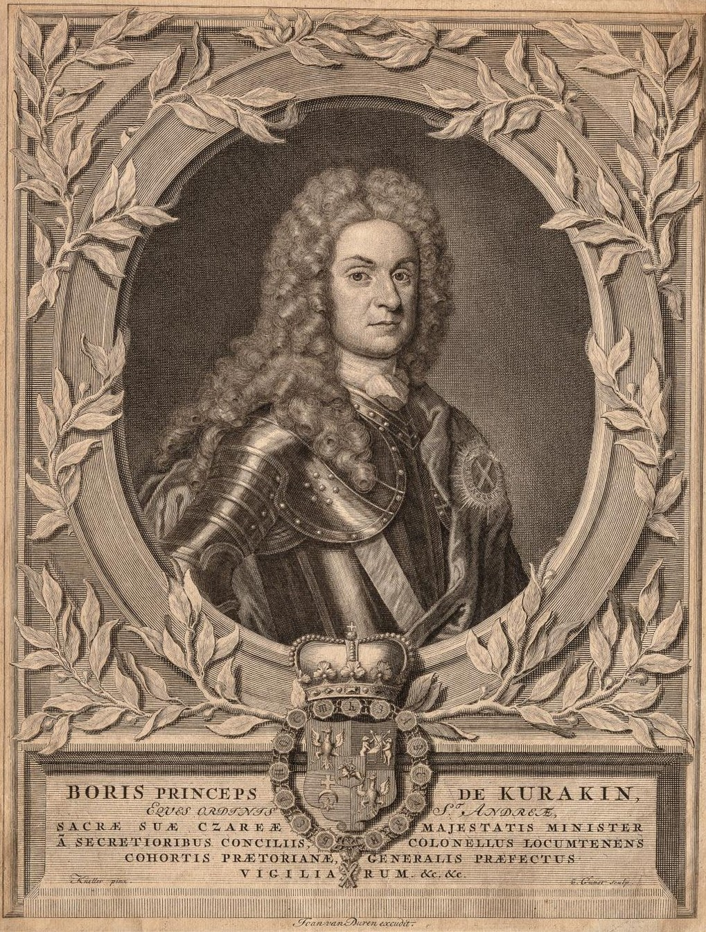 Boris Kurakin, Куракин, Борис Иванович